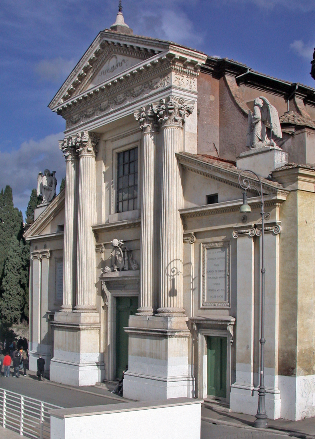 Italia, Roma, Chiesa di San Rocco in Augusteo, facciata ottocentesca